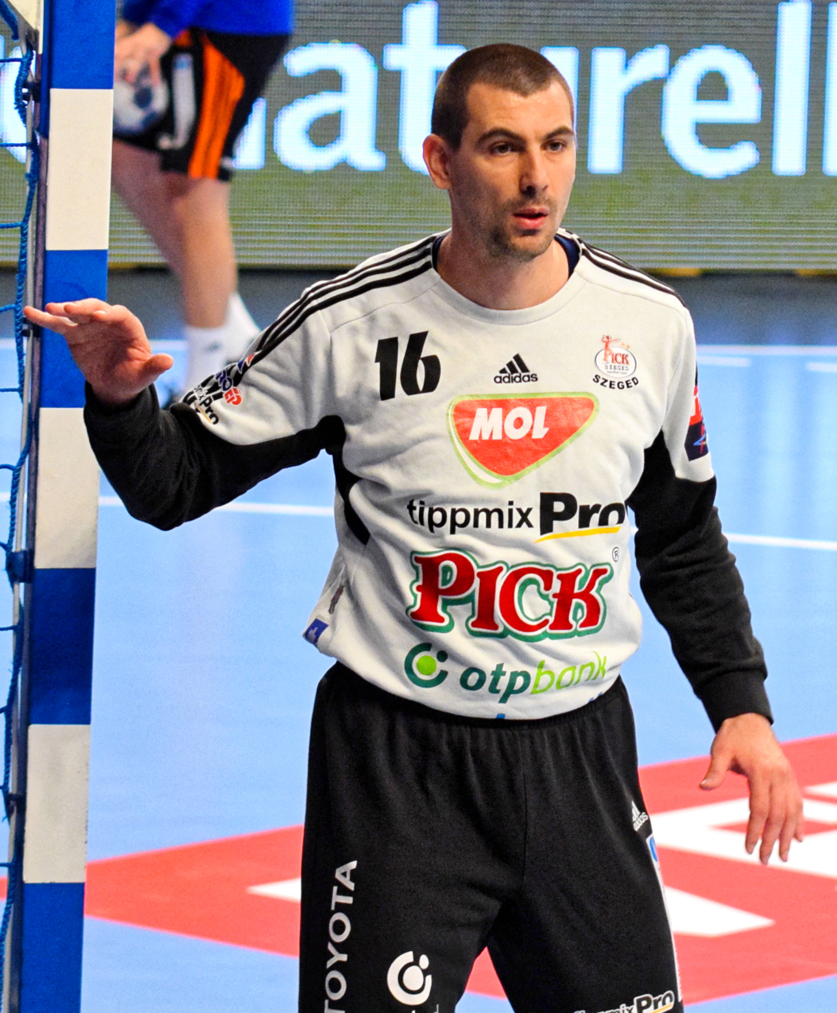 Rencontre de quart de finale de la ligue des champions 2016-17 entre le PSG et Pick Szeged. A Coubertin, le 29 avril 2017.